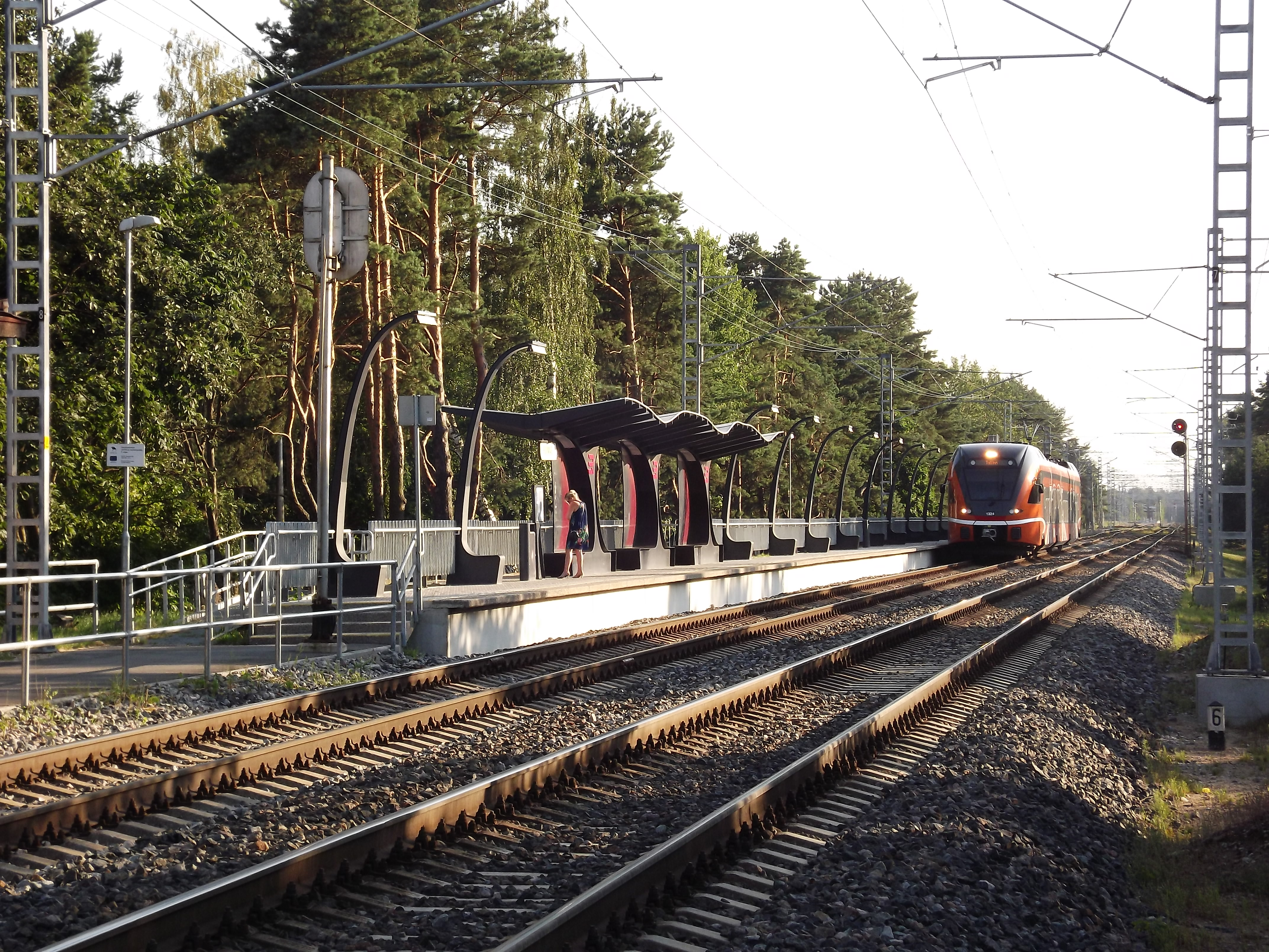 Kivimäe raudteepeatus, taamal Stadler FLIRT EMU 1324 "Apelsin".